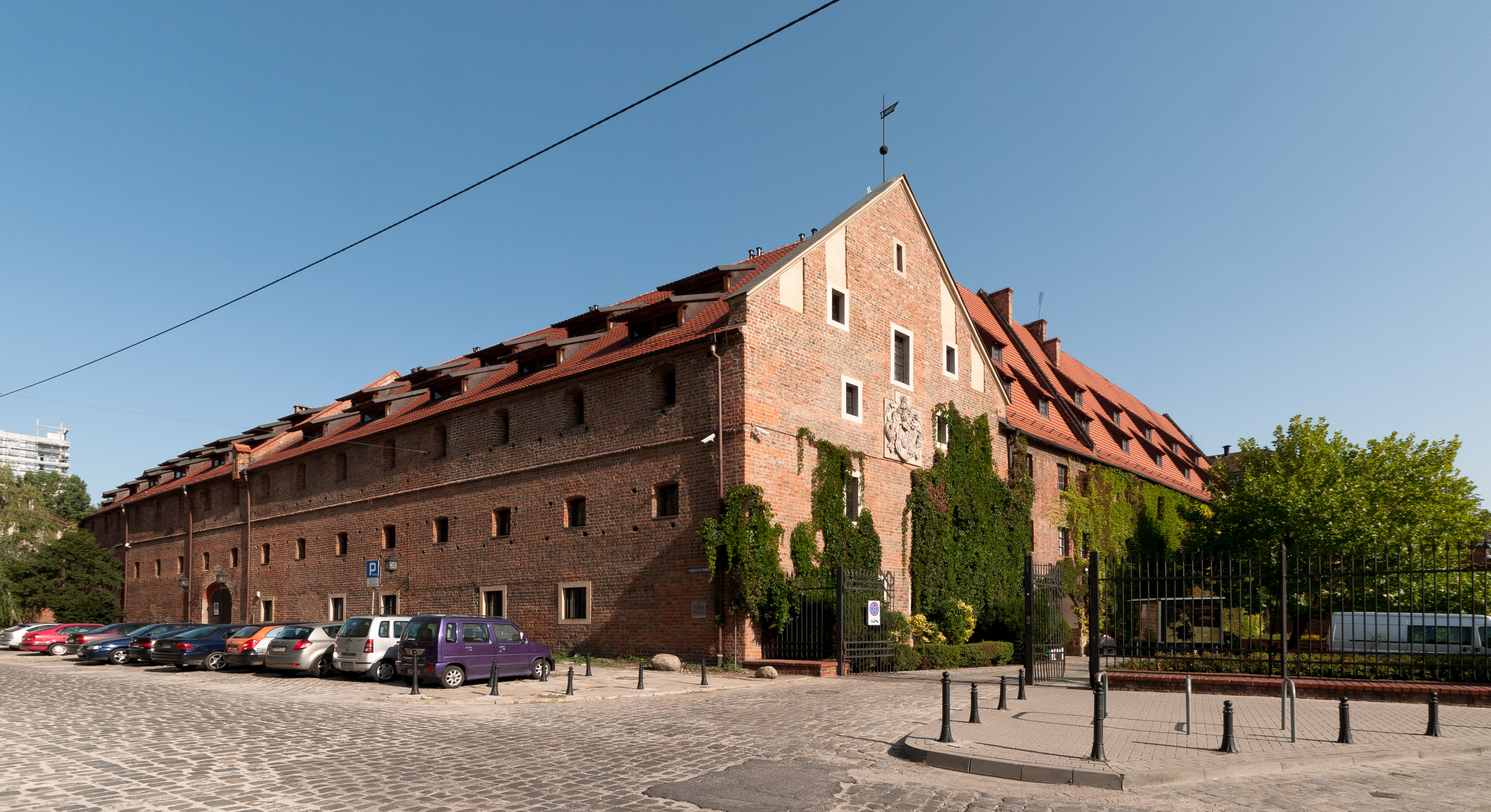 Arsenał Miejski, ul. Cieszyńskiego 9, Wrocław